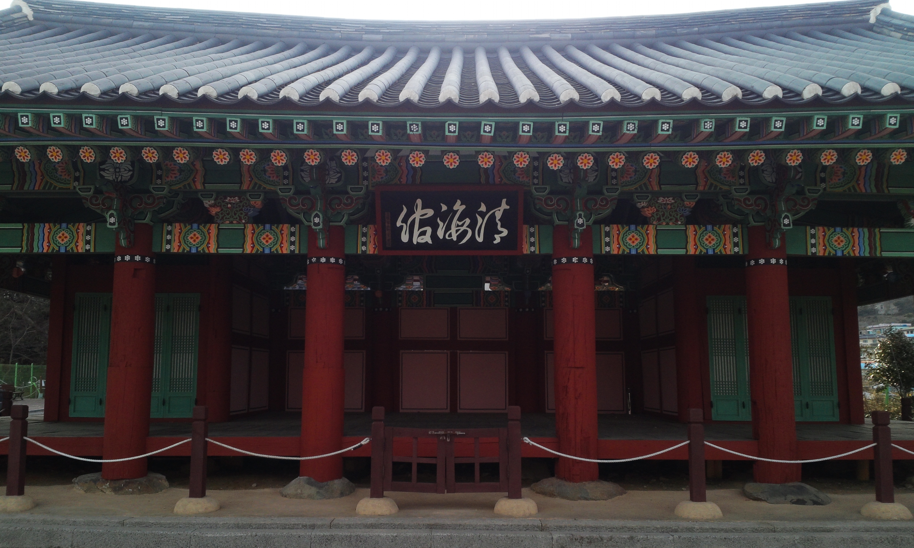 완도객사(가리포진객사)의 본청